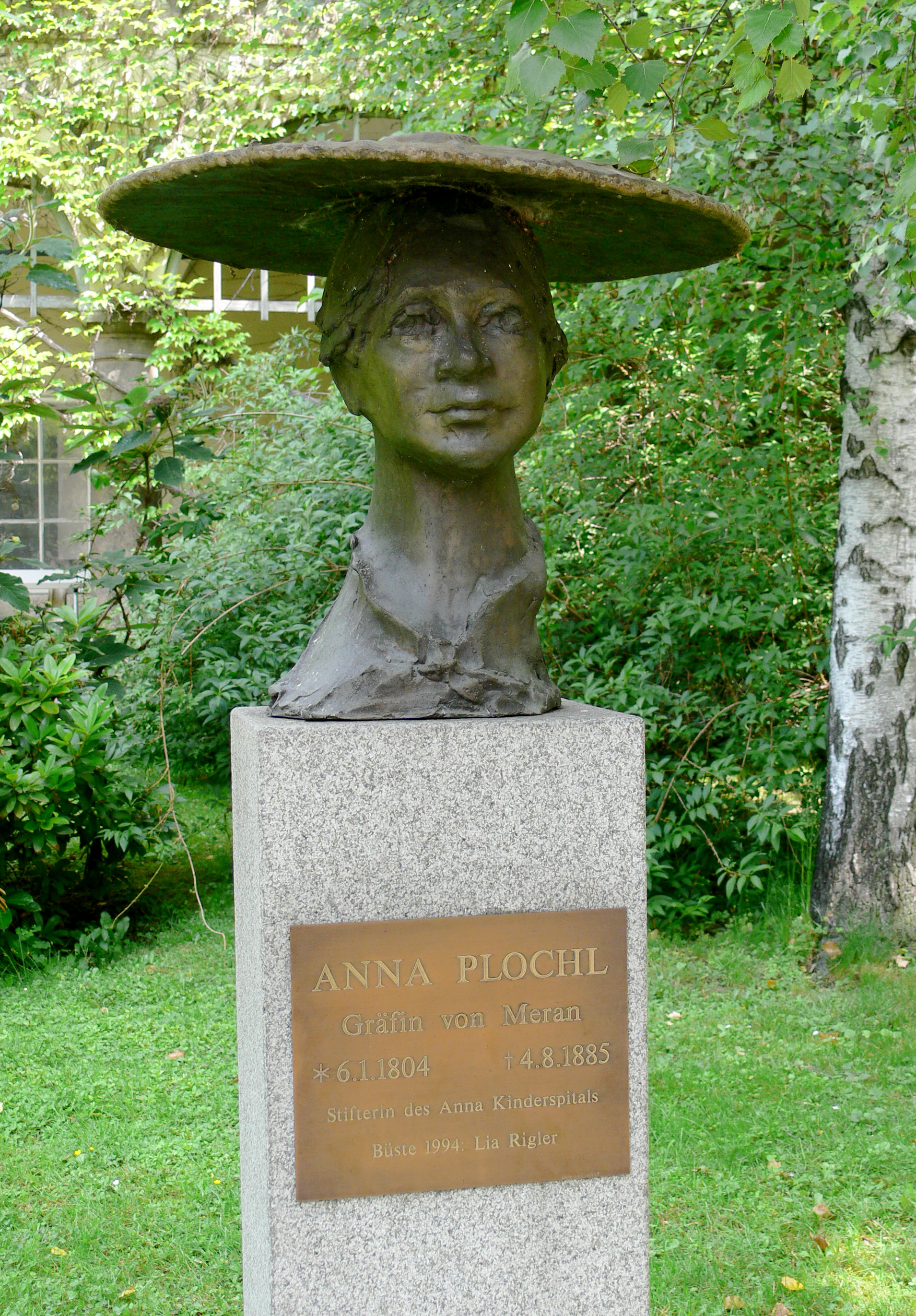 Ehrengalerie in einem Hof der Grazer Burg Büste „Anna Plochl“ von Lia Rigler, 1994